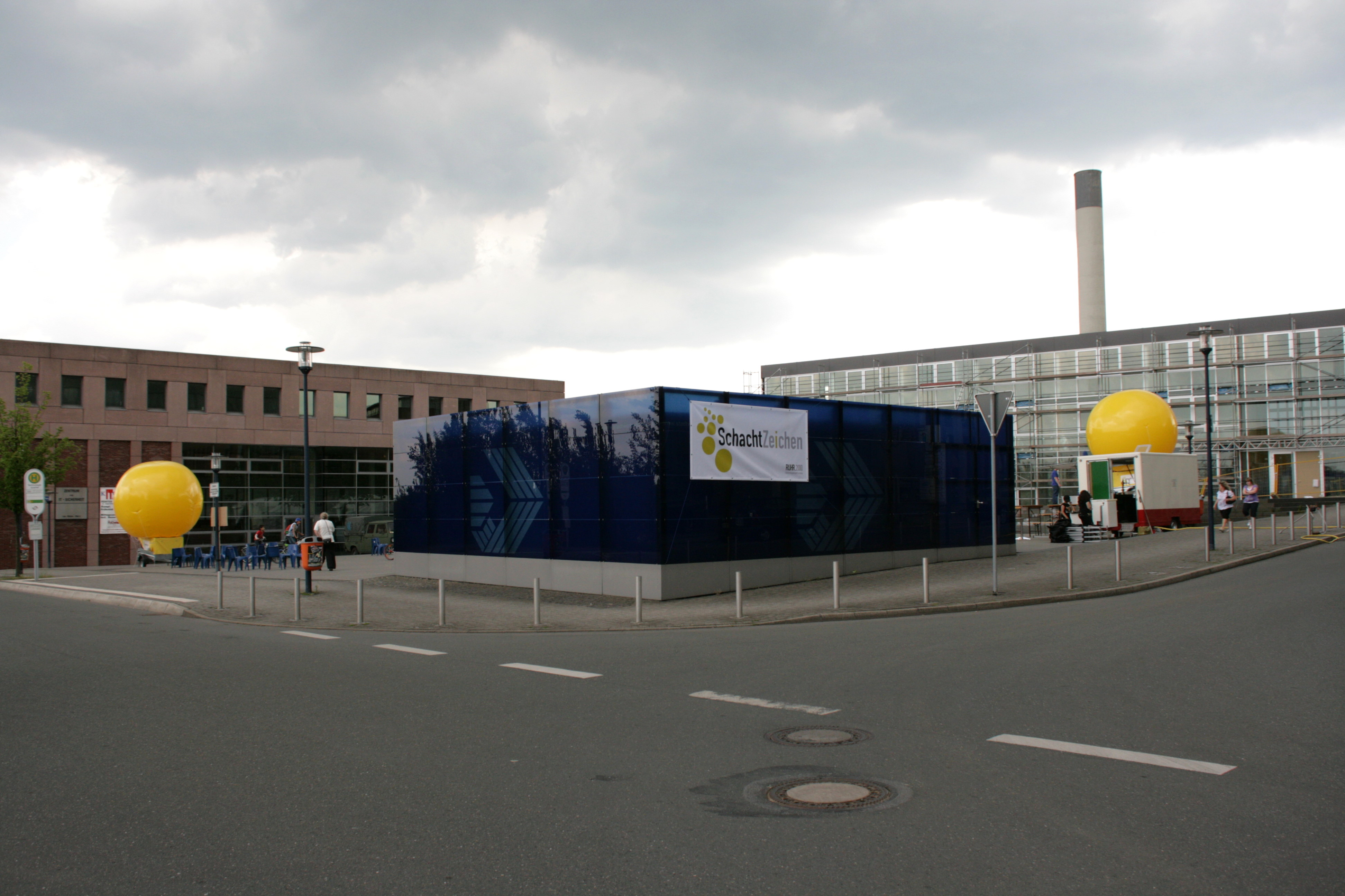 Jetziger Leonardo-da-Vinci-Platz an der Lise-Meitner-Straße, Schachtzeichen am früheren Standort von Schacht 5 und 6 der Zeche Mansfeld in Bochum